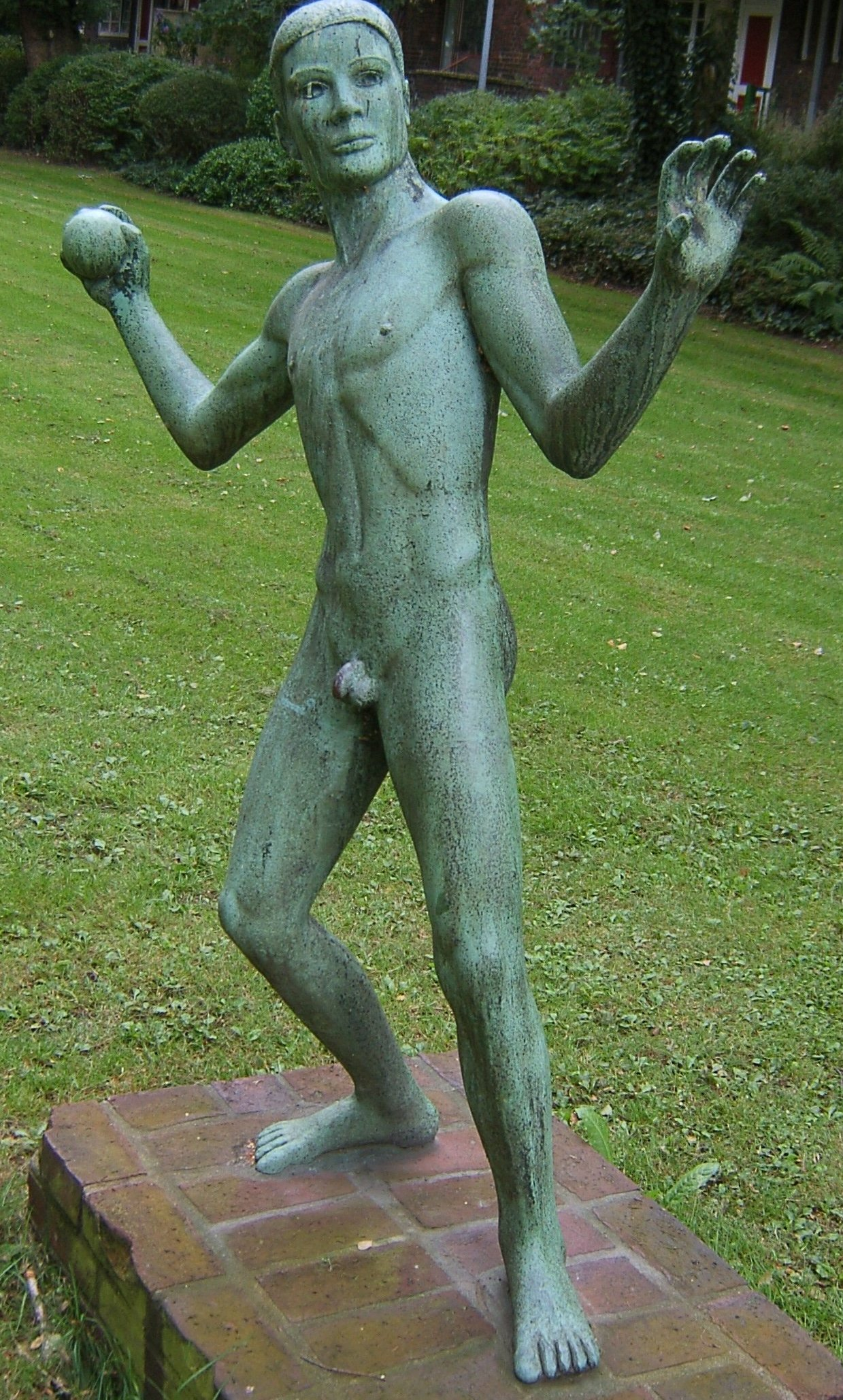 Skulptur von Ludolf Albrecht in Dulsberg